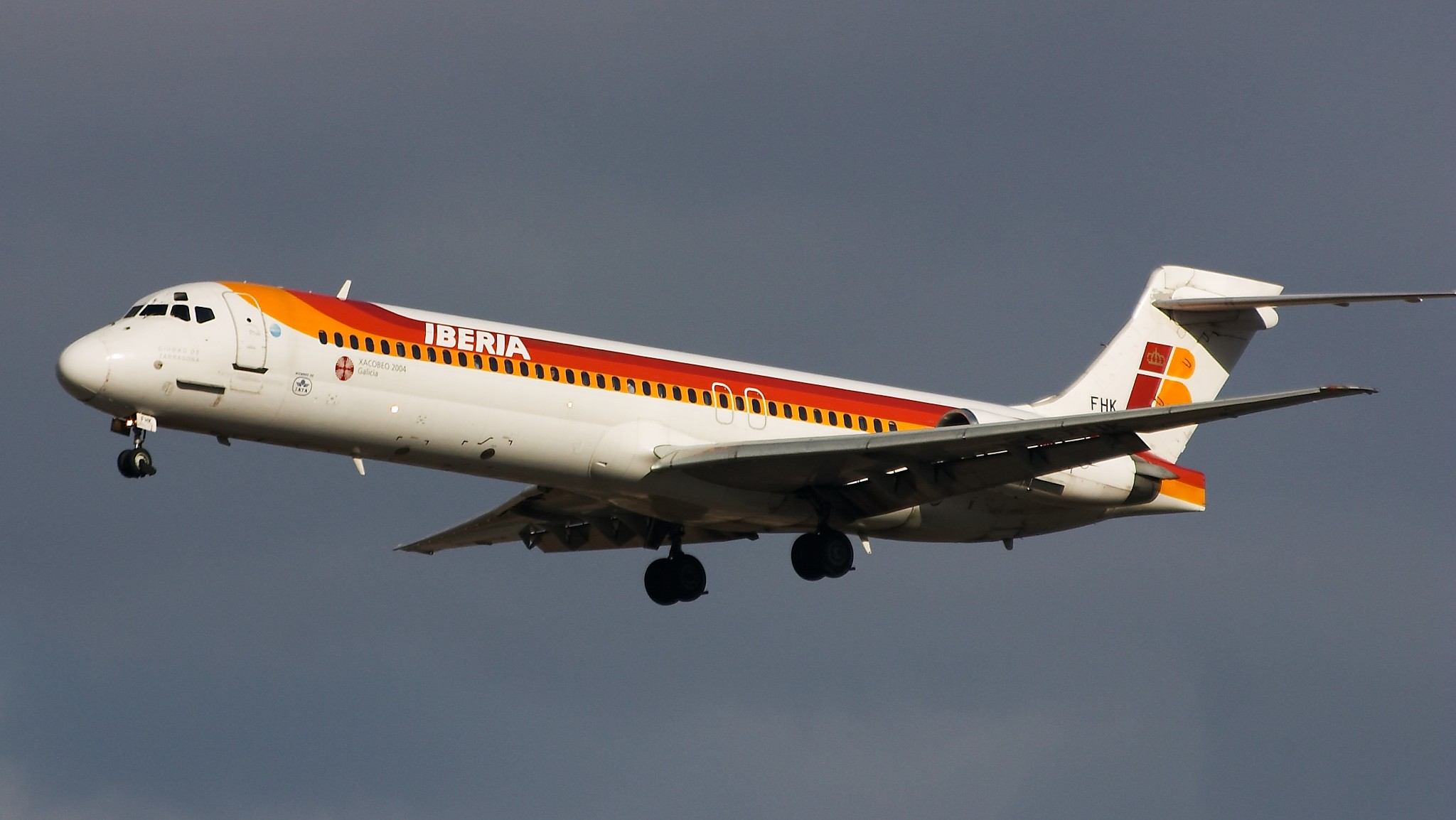 McDonnell Douglas MD-87 de Iberia a punto de aterrizar en la pista 33 del aeropuerto de Madrid Barajas.